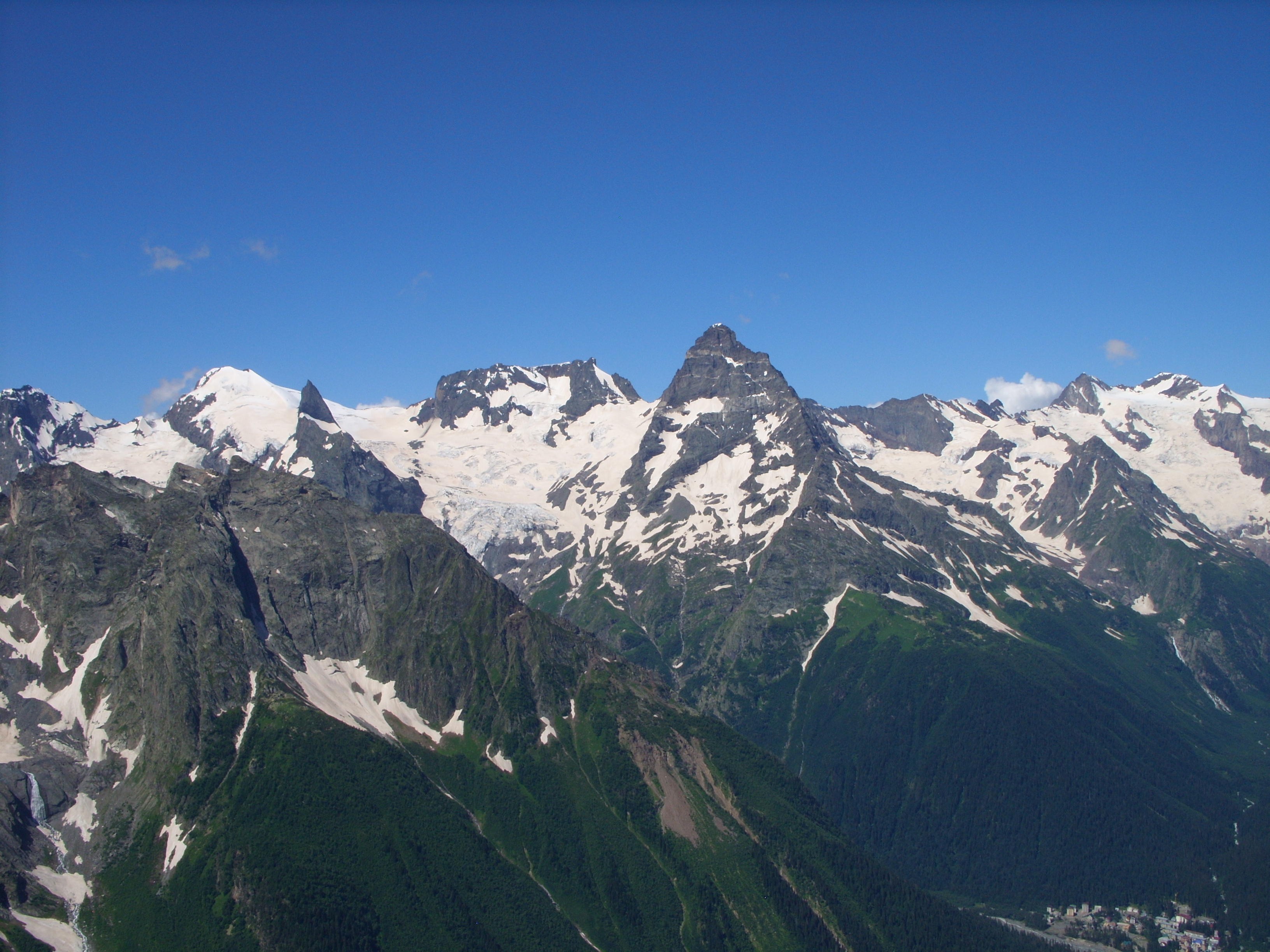 Экскурсия в Домбай из Железноводска, июль 2009 г.